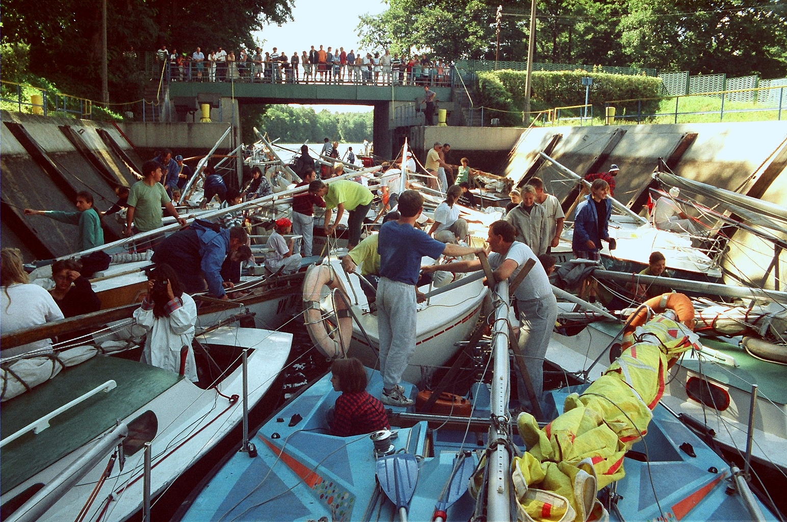 Śluza Guzianka. Śluzowanie jest chętnie obserwowane przez turystów stojących na moście drogowym.